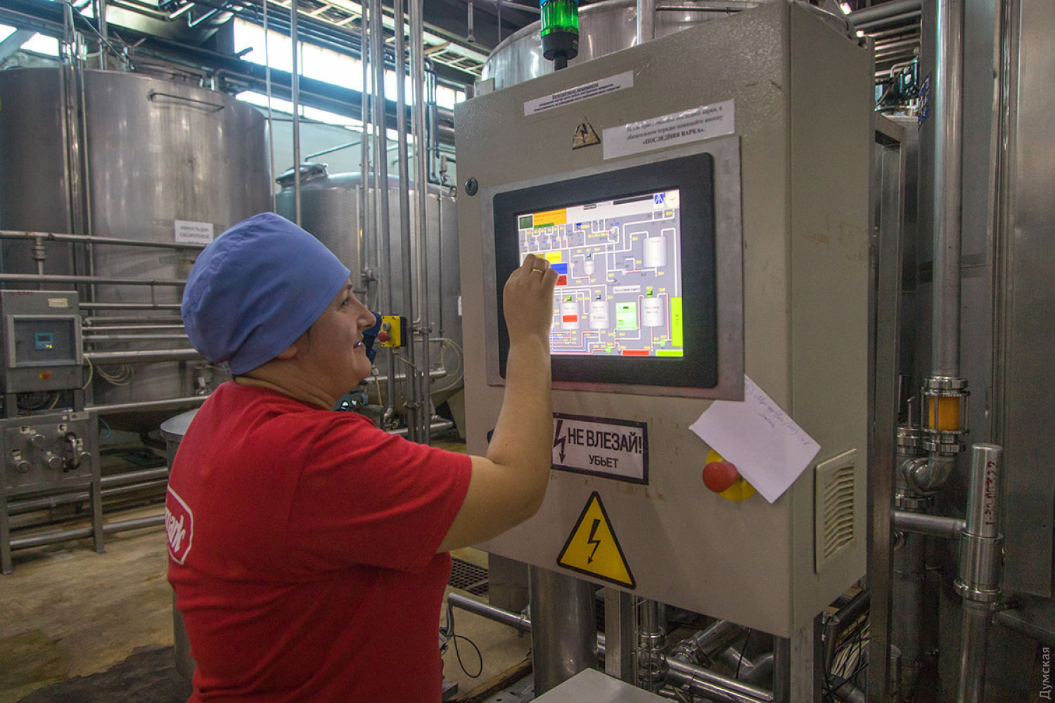 Сенсорная панель управления технологическими процессами